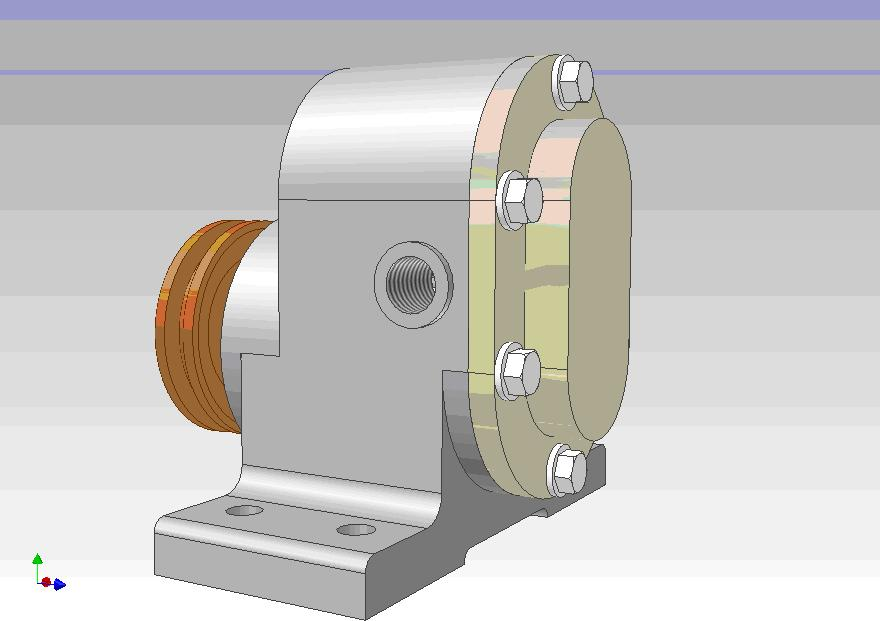 Esquema de una bomba hidráulica de engranajes dibujada por ordenador. Es un conjunto de tres esquemas.